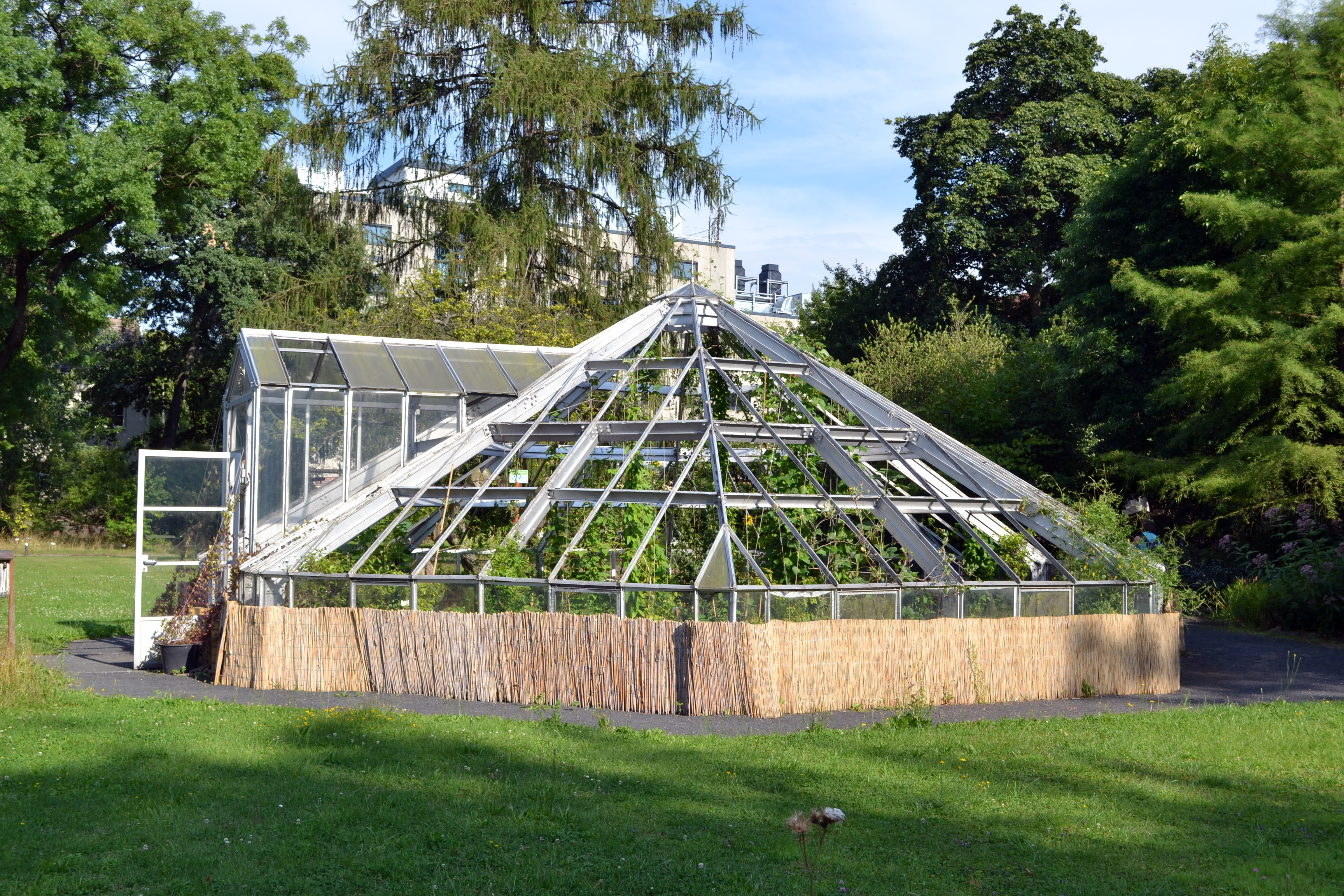 Historisches (Victoria-)Gewächshaus im Botanischen Garten der Universität Leipzig